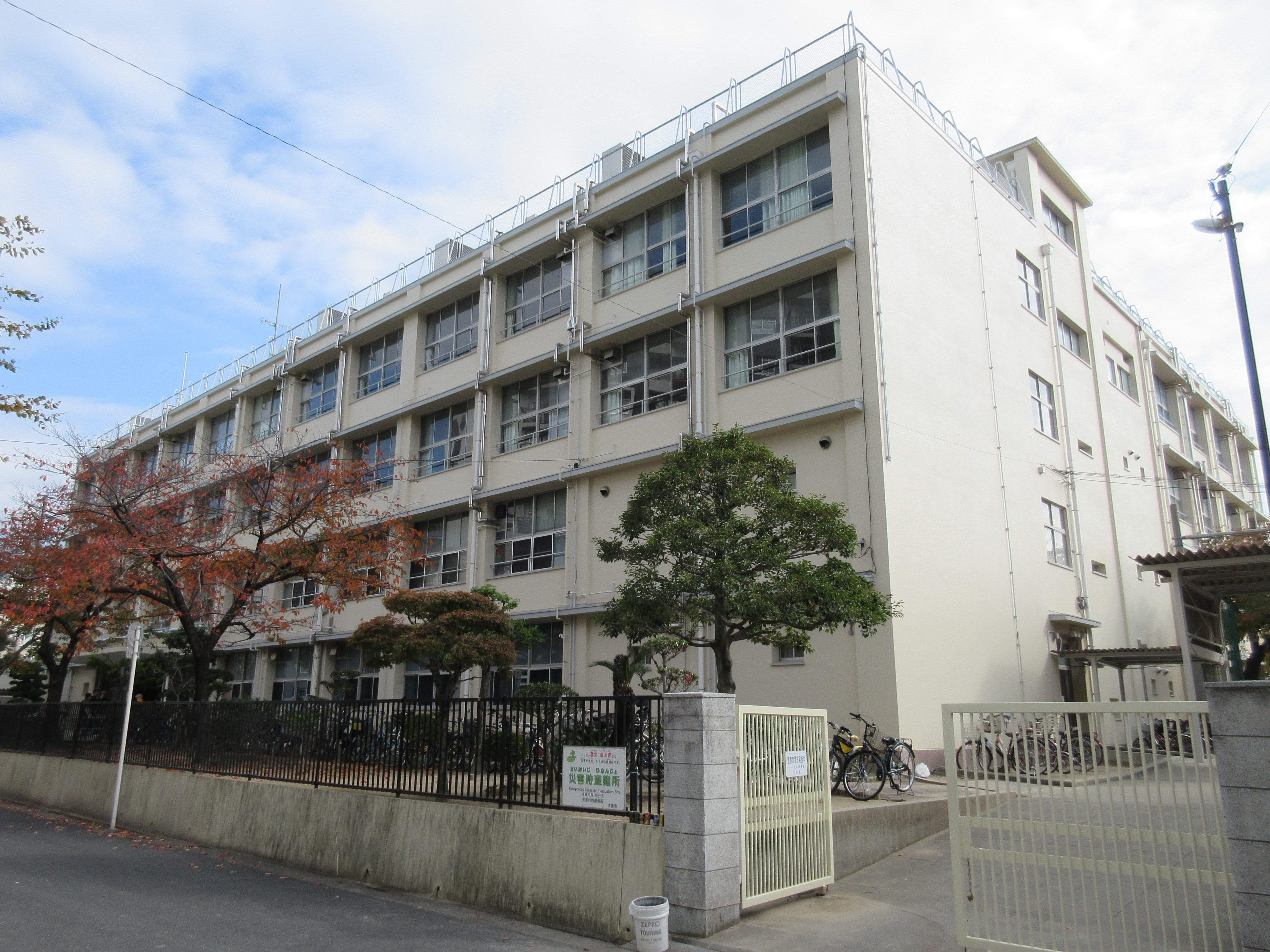 大阪市立井高野中学校